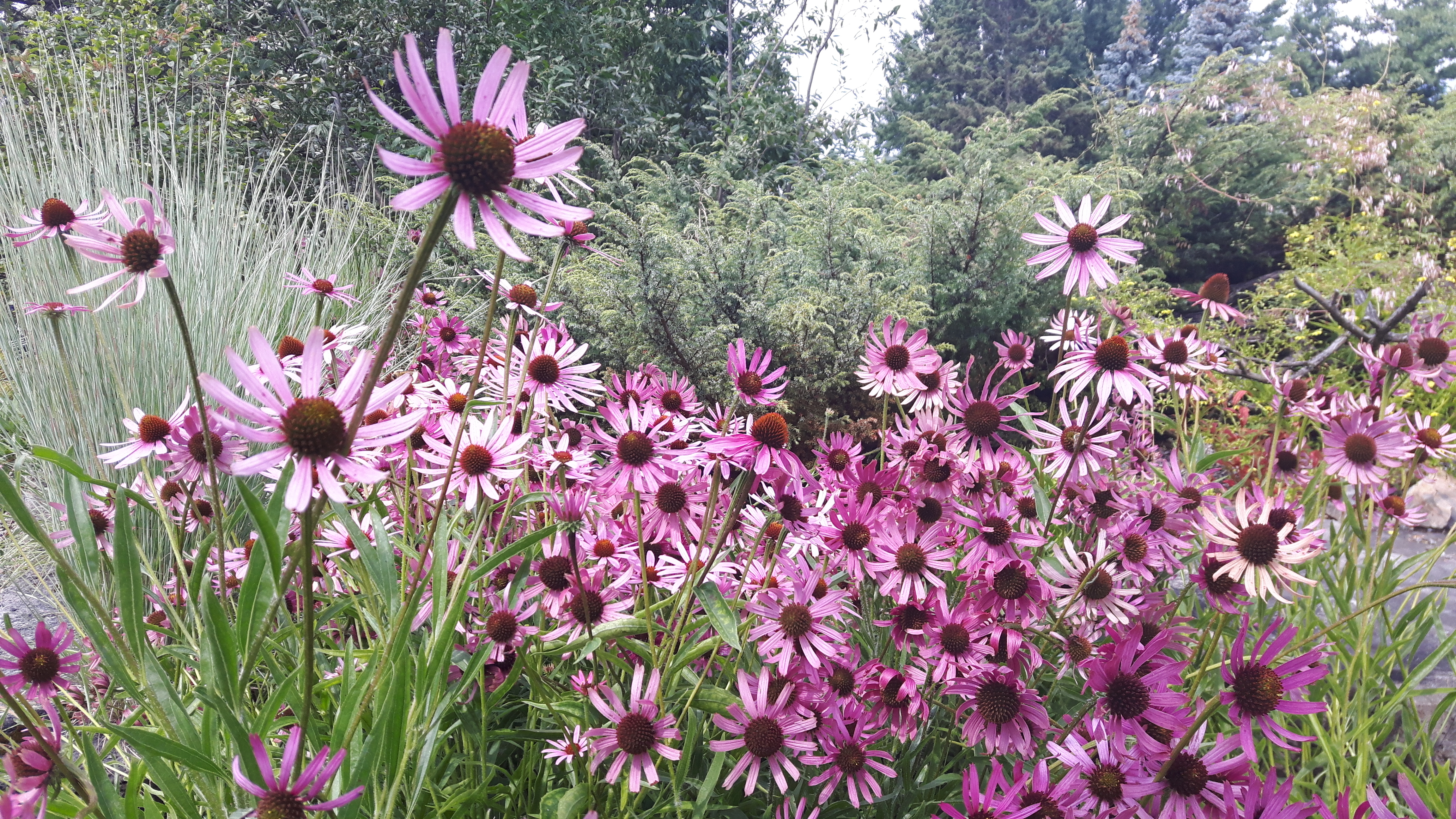 Echinacea tennesseensis, Montreal Botanical Garden.